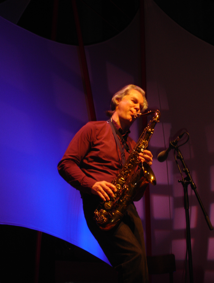 Jan Garbarek